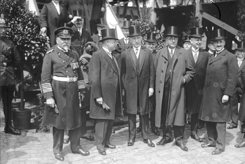 Der feierliche Stapellauf des neuen deutschen Kreuzers Köln auf der Staatswerft in Wilhelmshaven. Die feierliche Taufe wurde unter Anwesenheit des Reichswehrministers Groener ,des Admiral Zenker , dem Oberbürgermeister von Köln Adenauer sowie dem Oberpräsidenten von Hannover Noske und einer vieltausenköpfigen Menschenmenge vollzogen. die Festgäste anläßlich des Stapellaufes des Kreuzers Köln , v.lin.re.: Admiral Zenker, Reichswehrminister Groener, der Oberbürgermeister von Köln Adenauer, und der Oberpräsident von Hannover , Noske.